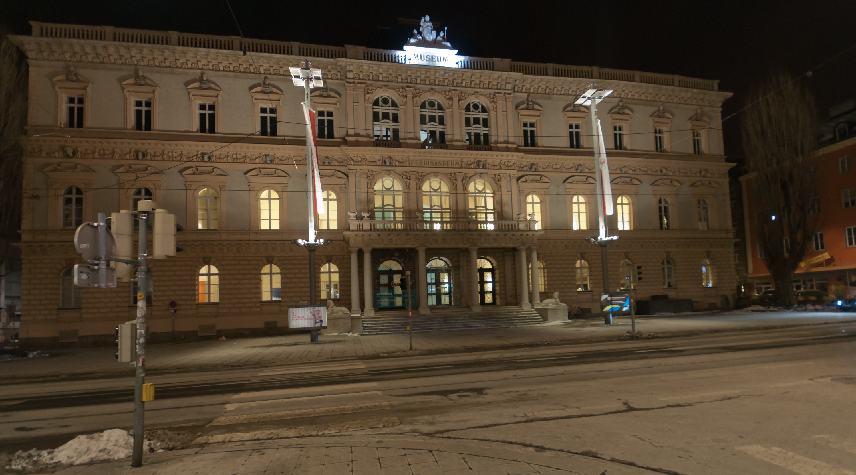 Außenansicht des Tiroler Landesmuseums in der gleichnamigen Museumstraße